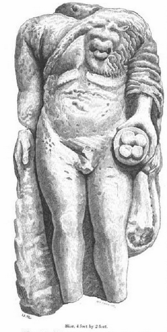 Torso einer Statue des Herkules, gefunden um 1761 in Rudchester, Hadrianswall (GB).